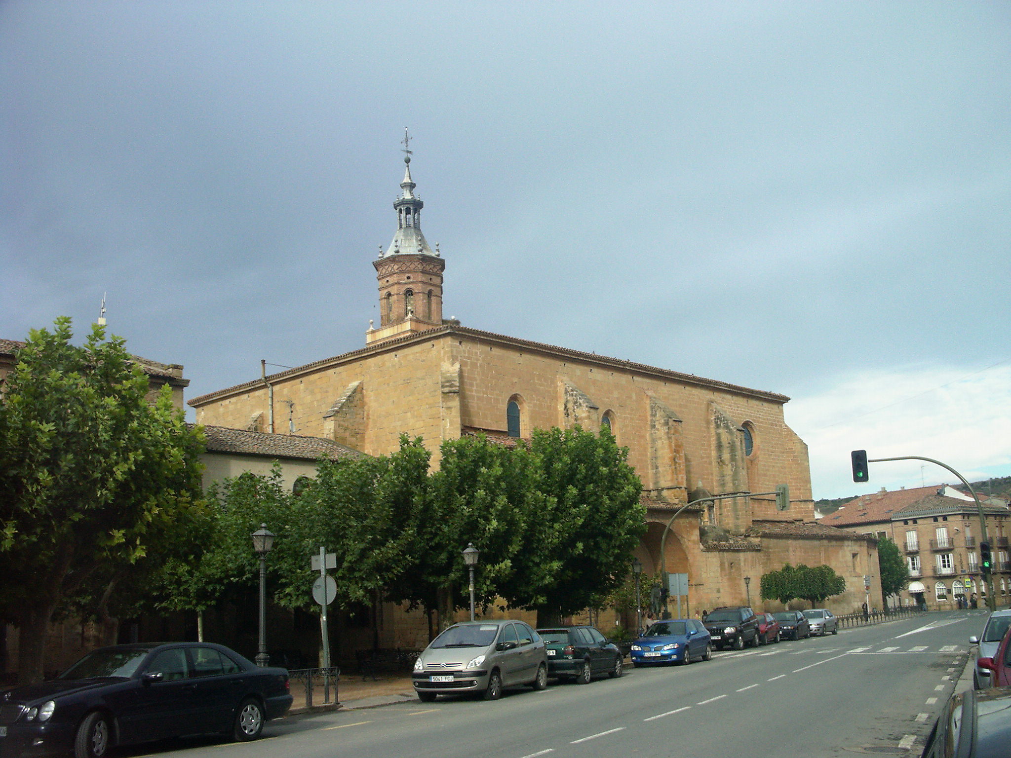 Fuenmayorreko Andra Mari eliza.